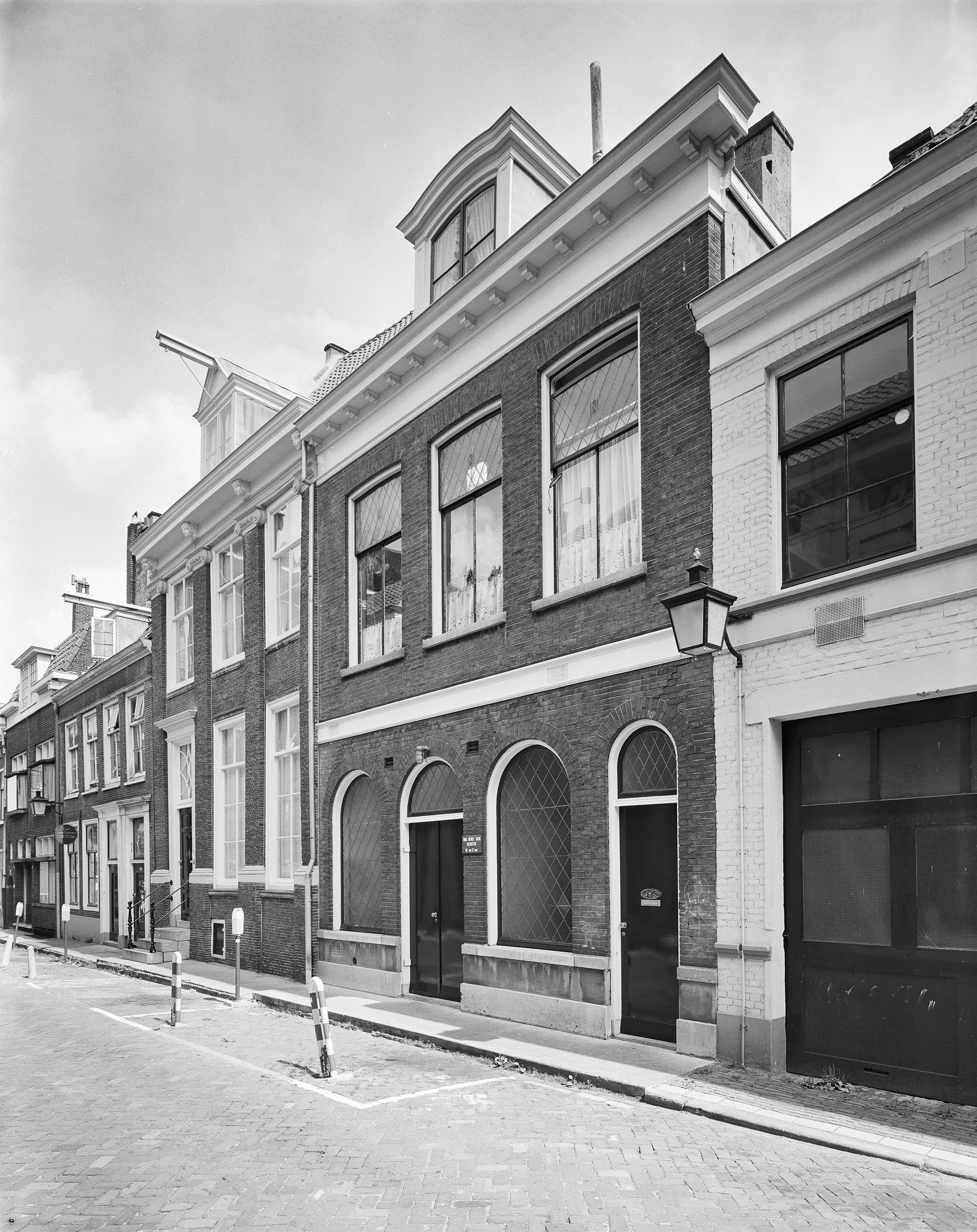 Exterieur VOORGEVEL van de Oud Gereformeerde Gemeente in Nederland